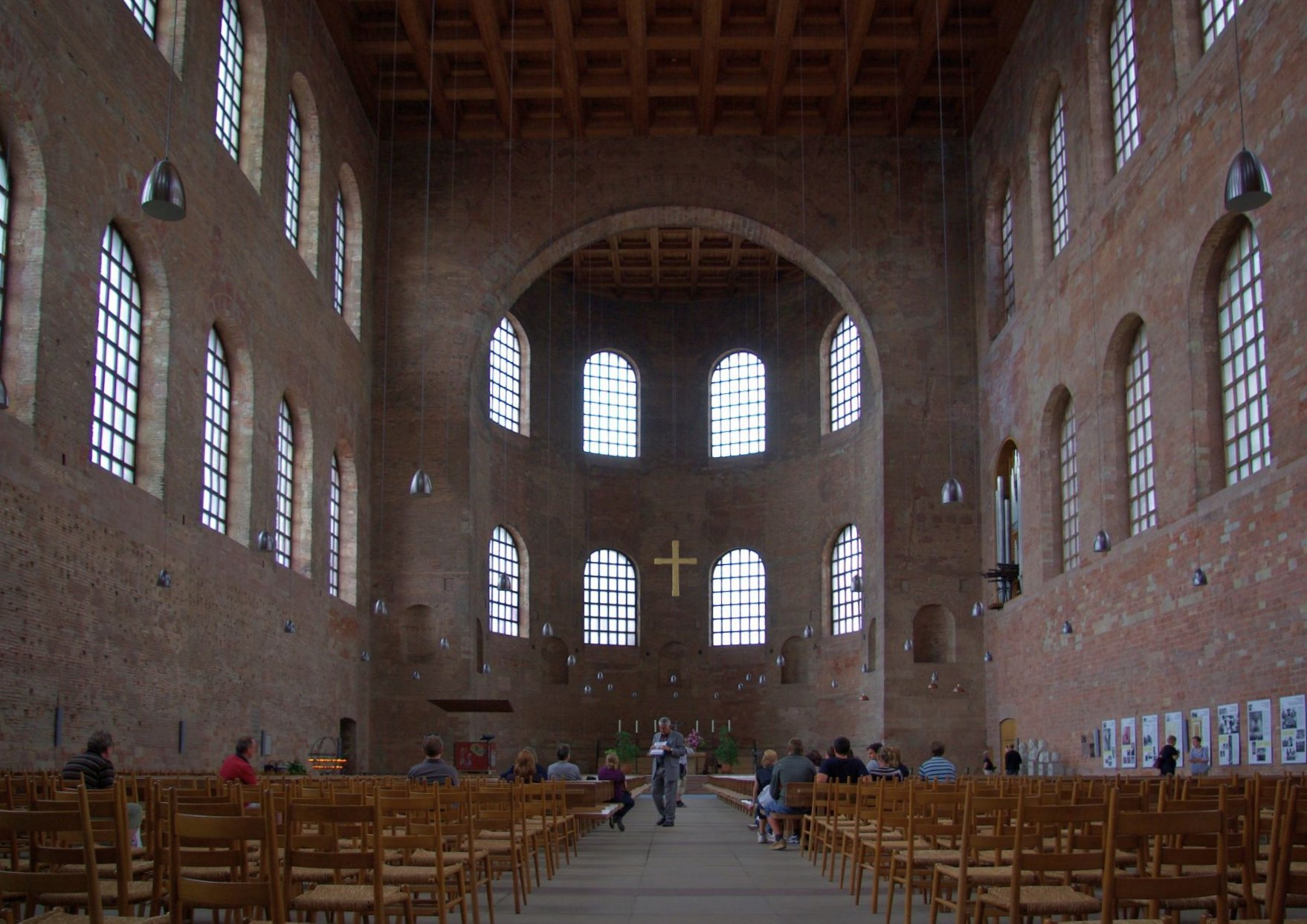 Konstantinbasilika in Trier